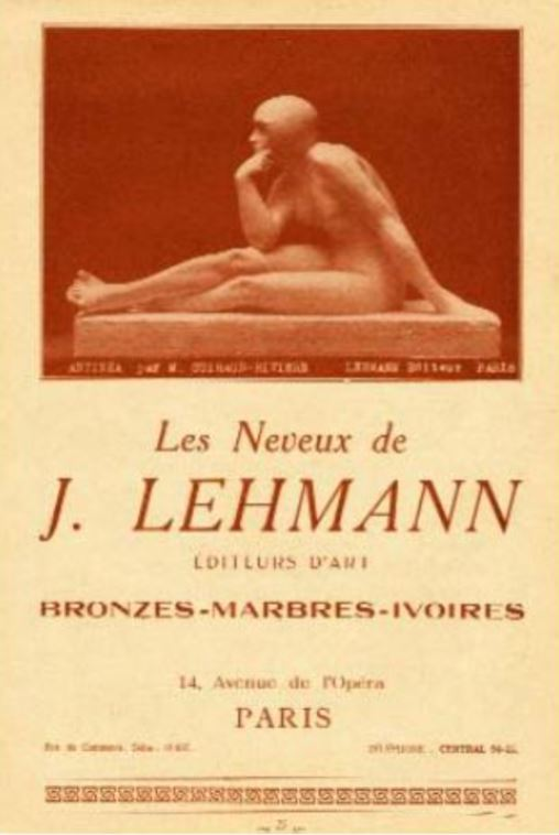 Reklame von Les Neveux de Jules Lehmann in Paris. Zeigt Maurice Guiraud-Rivières Antinèa.